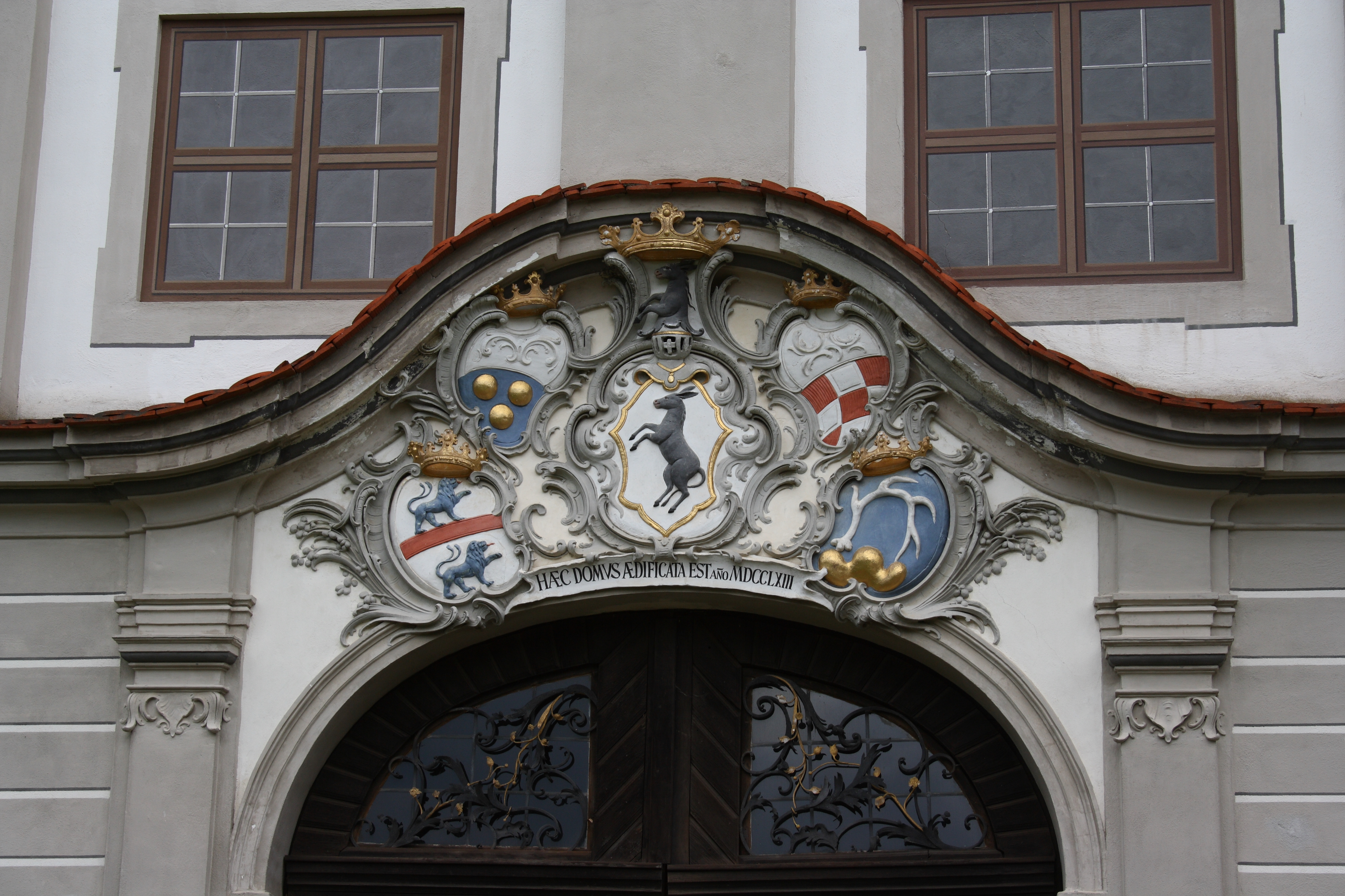 Schloss in Harthausen, einem Ortsteil von Rettenbach im Landkreis Günzburg (Bayern)